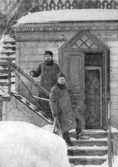 Антон Павлович и Михаил Павлович Чеховы в Мелихове на ступеньках флигеля. Фотография 1895 г. // Чехов М. П. Вокруг Чехова. Встречи и впечатления. М.: Московский рабочий, 1960. — 352 с. — 75 000 экз.